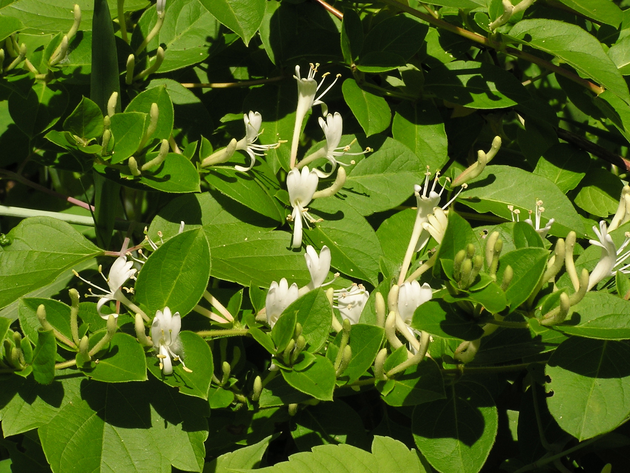 Lonicera japonica in flower